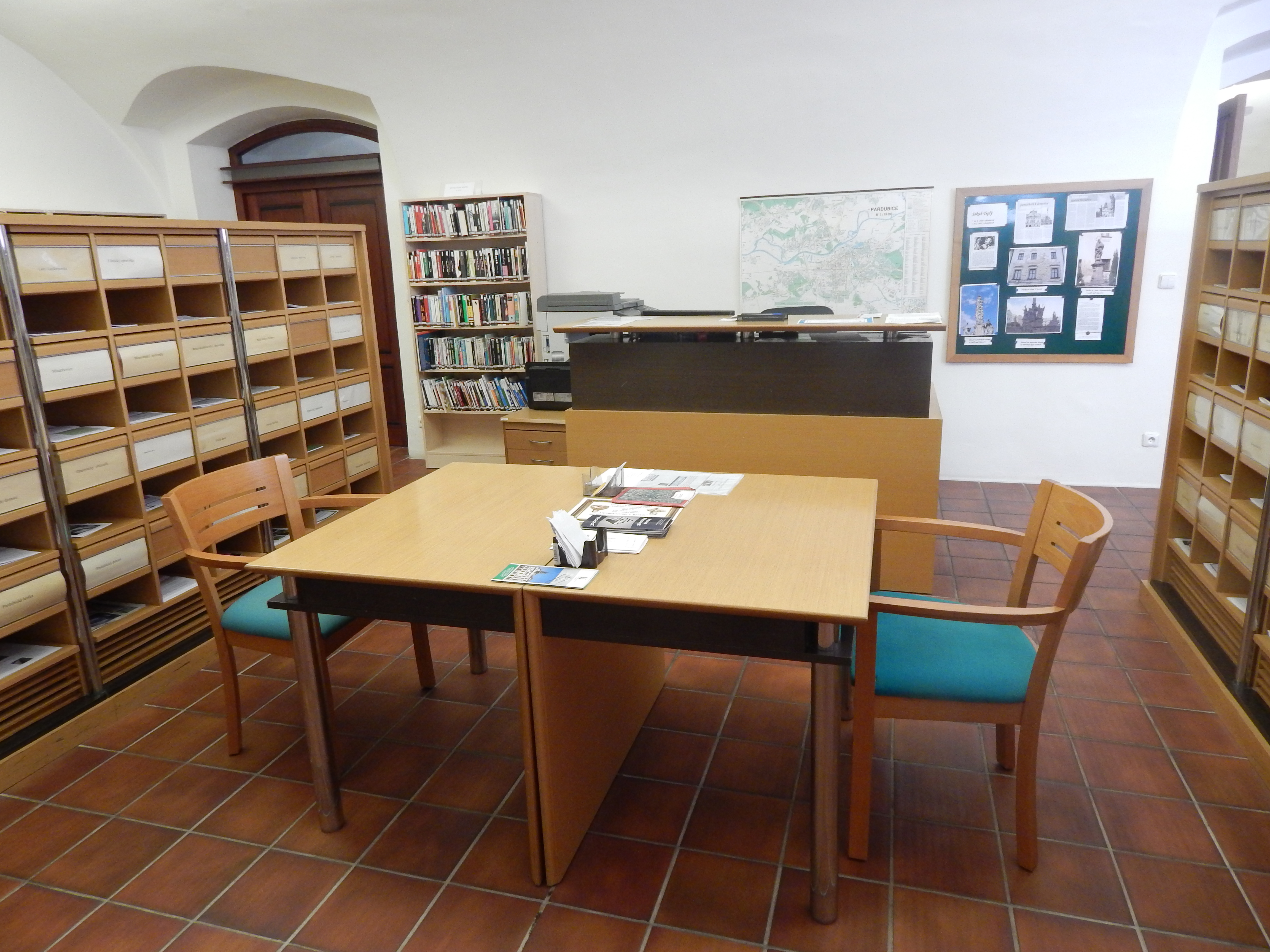 regionální studovna Krajské knihovny v Pardubicích